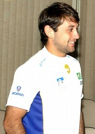 Judo World Champion João Derly (Brazil)